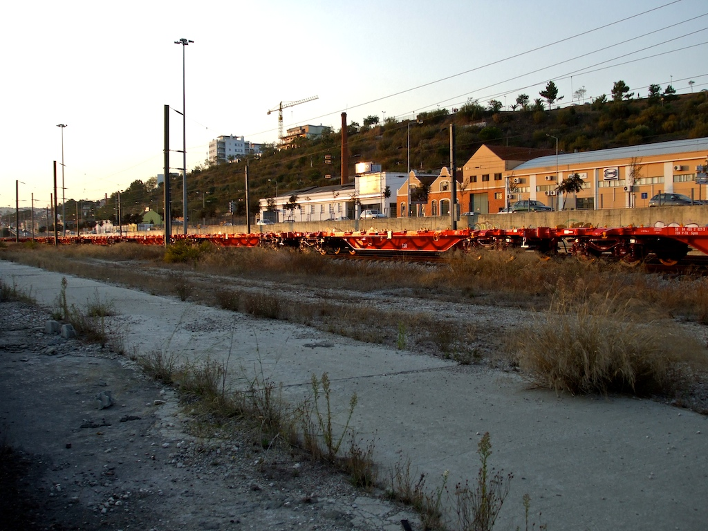 Tipo: Vagões plataforma (transporte de contentores) Local: Setúbal • Mar [Linha do Sul, PK 29] Data e hora: 25 de Setembro de 2008 [18h58] Material: Takargo Sgnss [série 455 2]